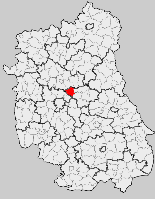 Map of gmina Spiczyn, Łęczna county, Lublin voivodship Mapa gminy Spiczyn, powiat łęczyński, województwo lubelskie